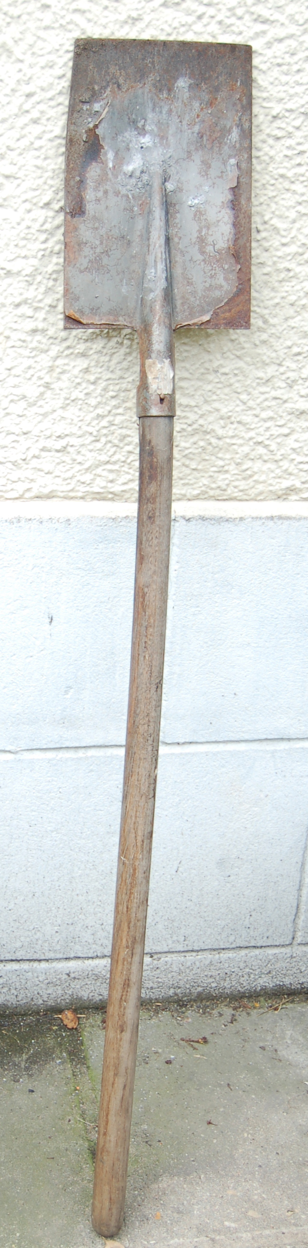 Bêche - Dig